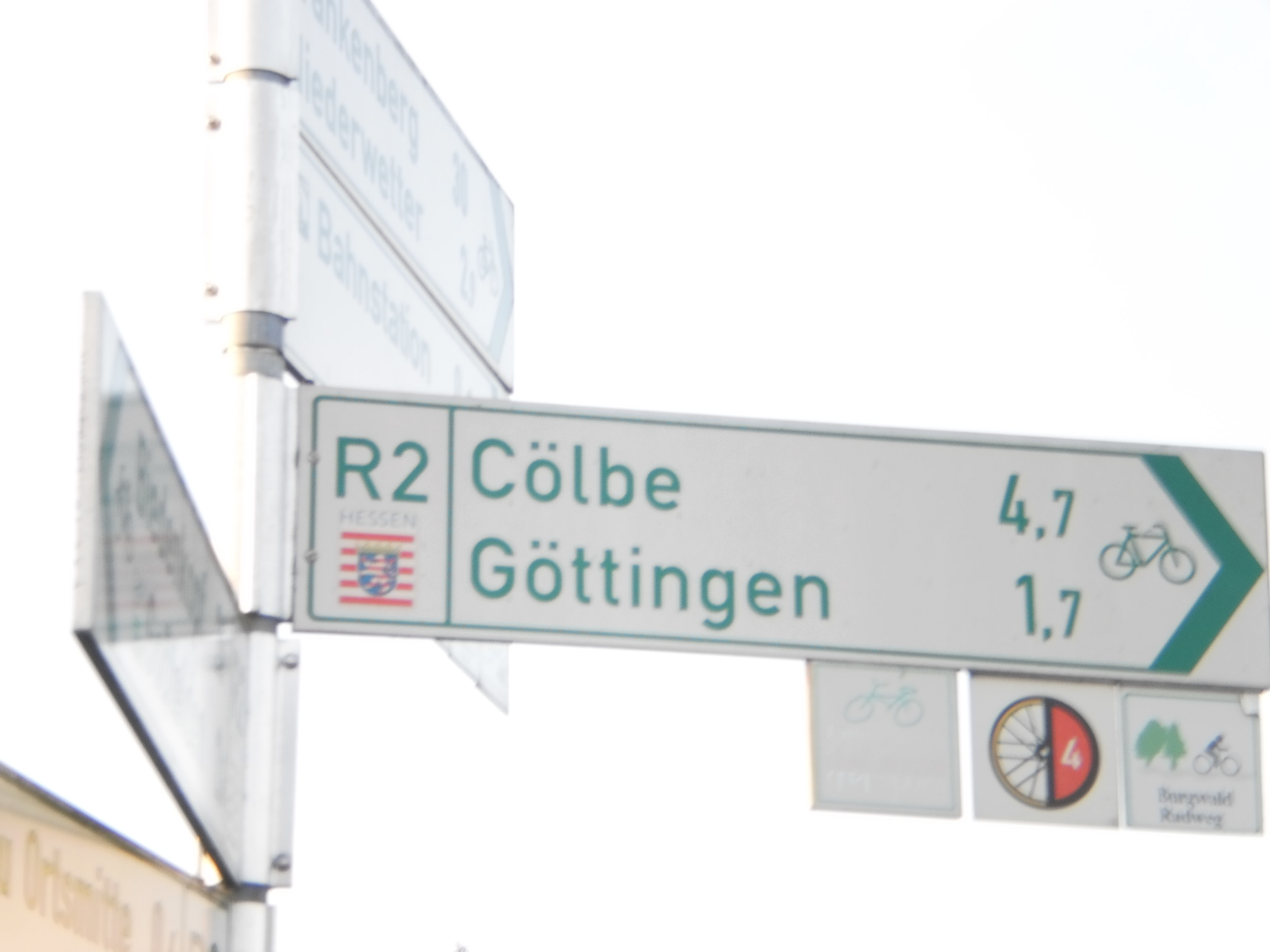 Beginn des Lahn-Eder-Radwegs am Lahntalradweg in Sarnau-Lahntal. Der Lahn-Eder-Radweg ist in diesem Abschnitt bis Wetter identisch mit der Kreisstrasse 81, die möglicherweise für Alltagsverkehr, Pendler nach Marburg und den Tourismus im Burgwald ausgebaut wird. Weiter hinten ist der Bahnübergang am Bahnhaltepunkt Sarnau an der Oberen Lahntalbahn, nach rechts geht es Richtung Marburg und Cölbe (4,7 km) (März 2016).